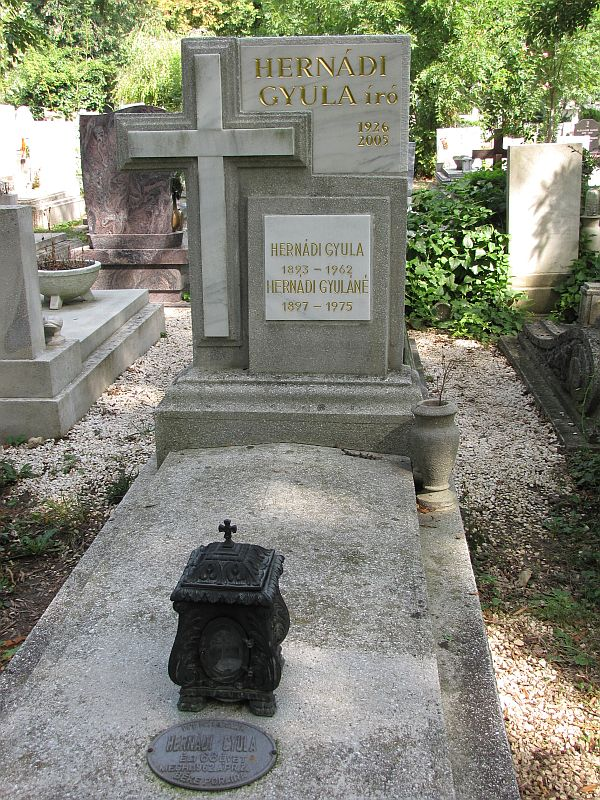 Hernádi Gyula (Oroszvár (ma: Szlovákia), 1926. augusztus 23. – Budapest, 2005. július 21.) író, forgatókönyvíró sírja Budapesten. Farkasréti temető: 31a-3-9.